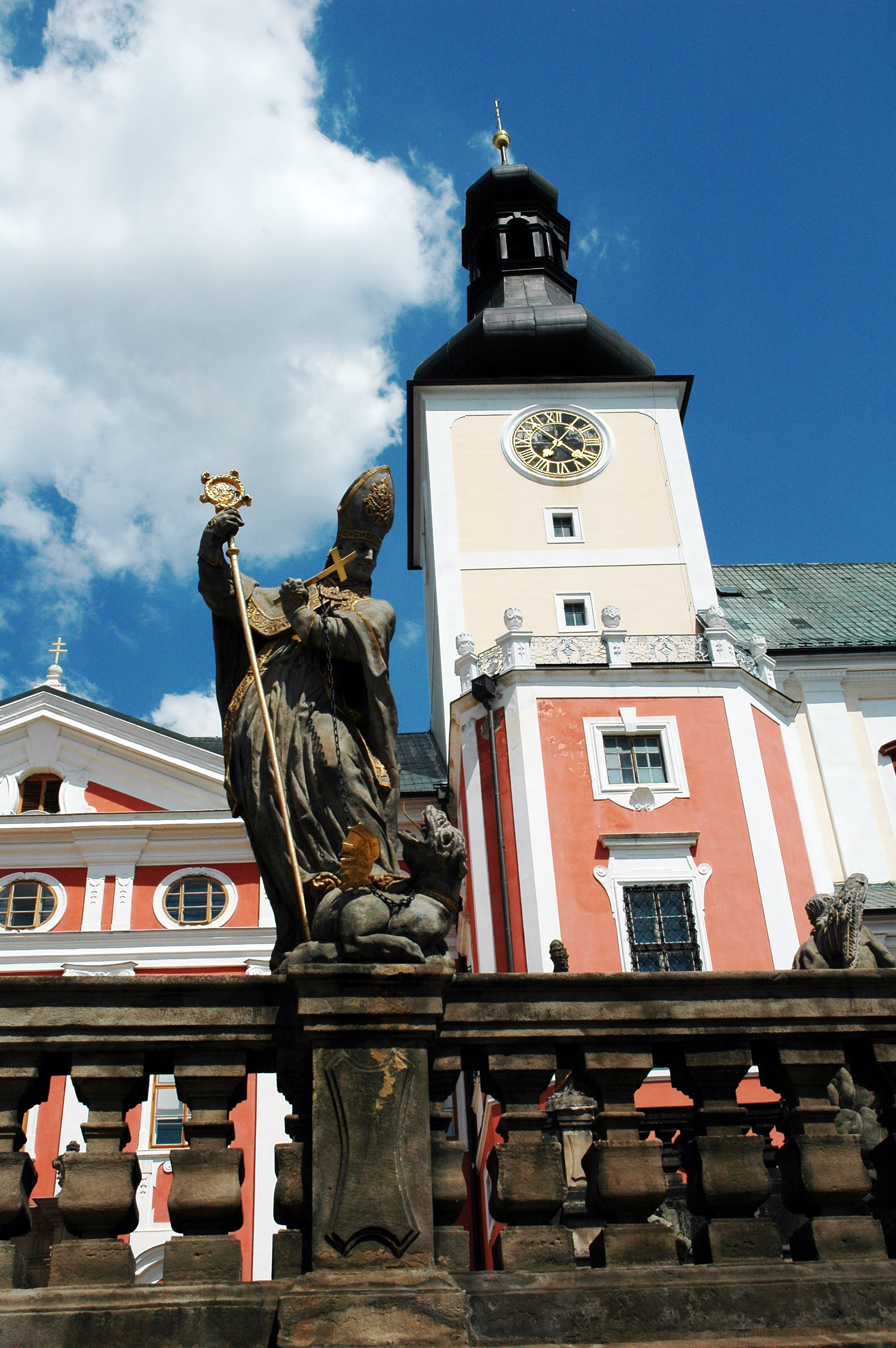 pohled na opravenou část kláštera v Broumově